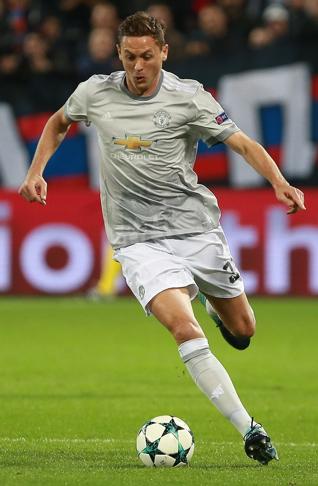 Матч между ЦСКА и «Манчестер Юнайтед» 27 сентября 2017 года